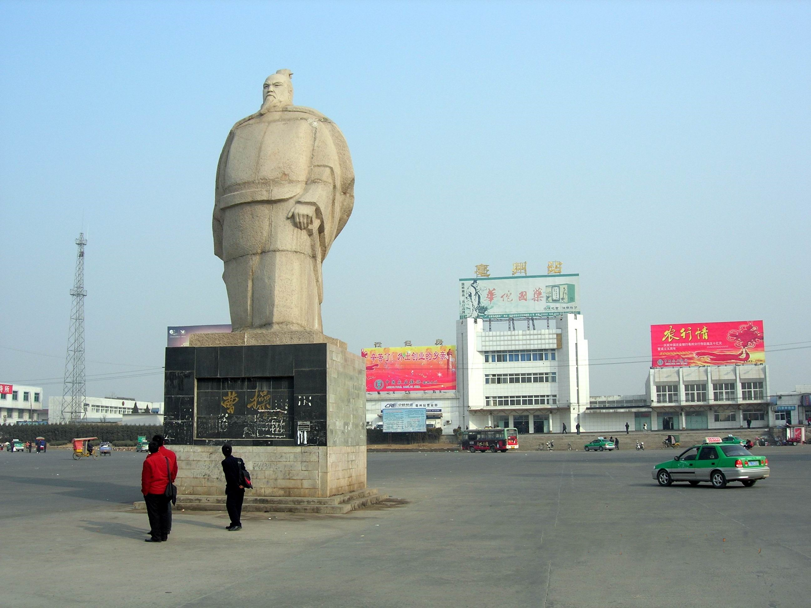 亳州市亳州火车站广场－曹操雕塑